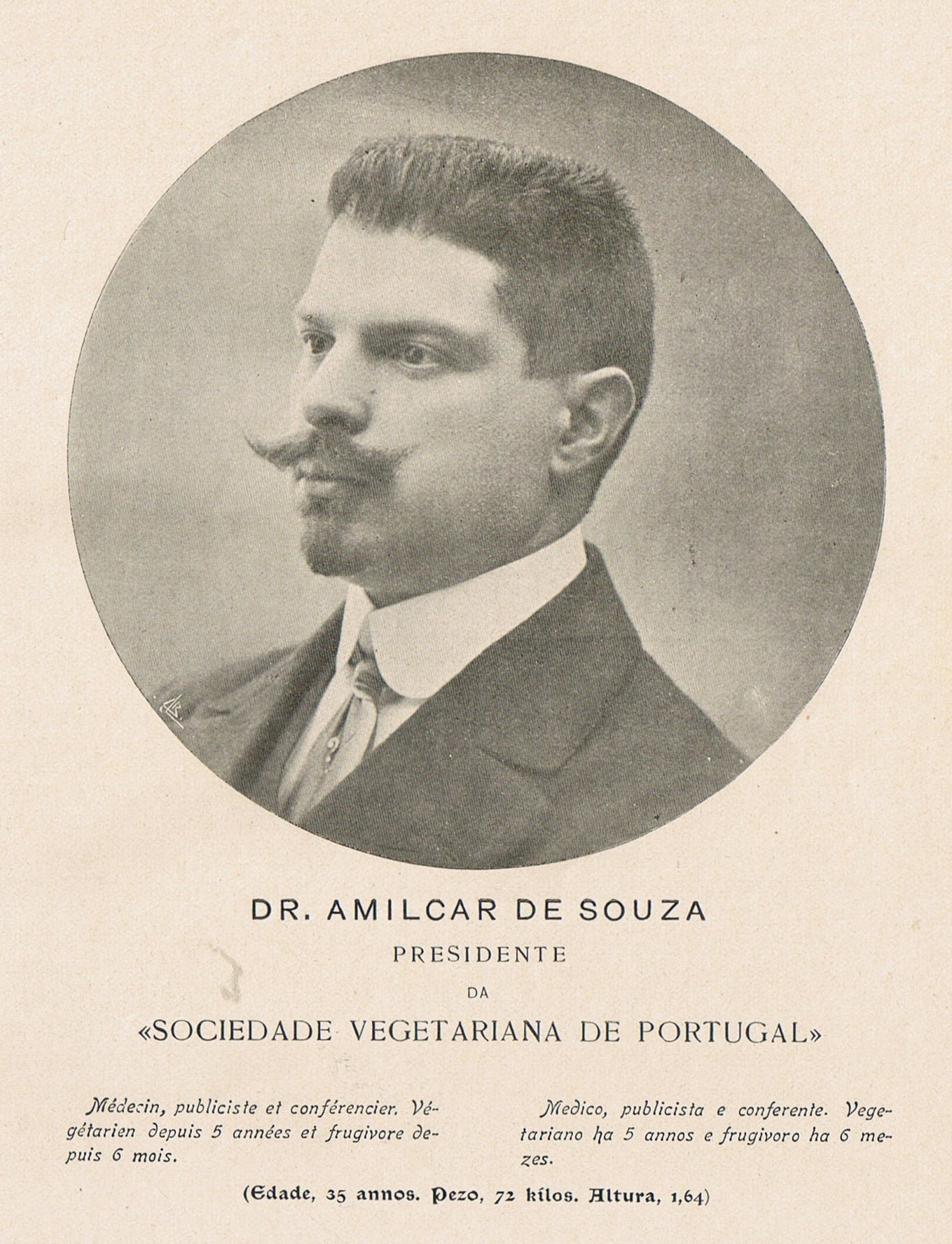 Portrait of Dr. Amílcar de Sousa